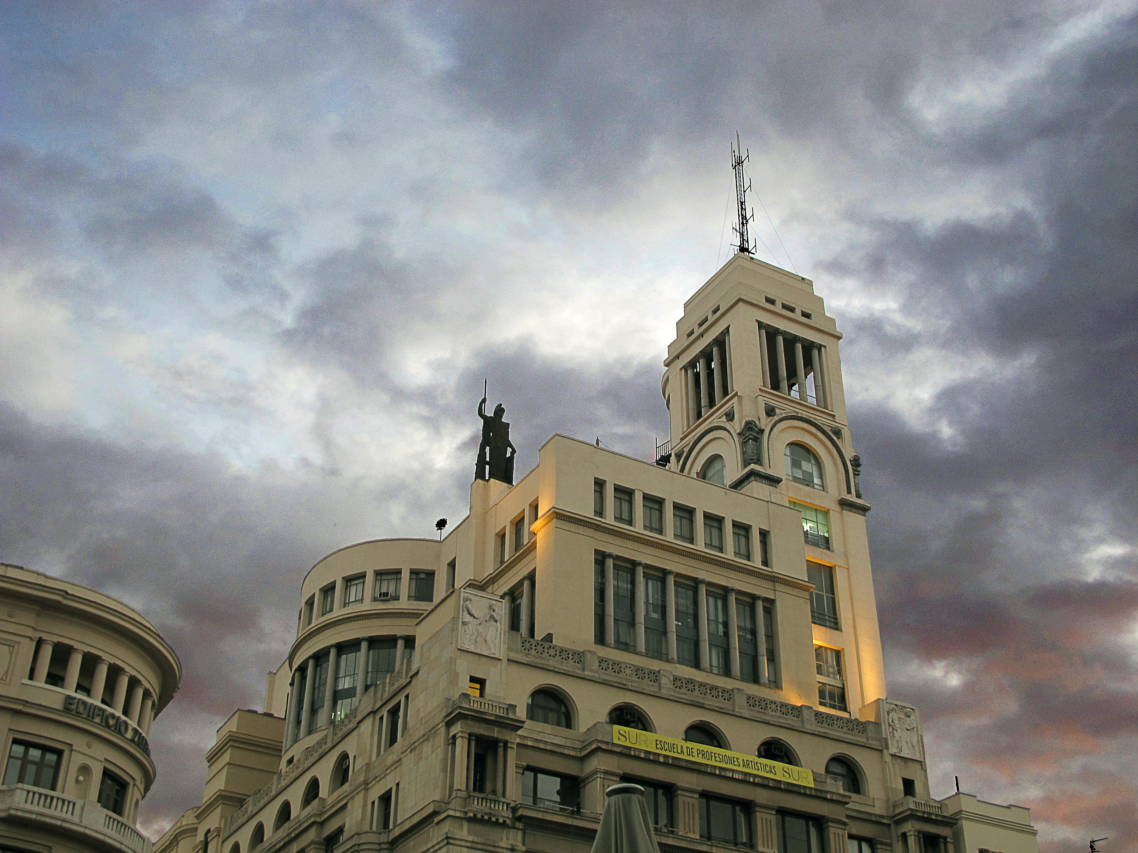 Según su antiquísima leyenda, nunca tuvo amantes, por lo que recibió el nombre de Atenea Parthenos (Atenea virgen). La diosa de la sabiduría, las artes y la guerra. Minerva en la mitología romana En su honor se edificaron varios templos, el más famoso fue el Partenón, en la Acrópolis de Atenas, ciudad que quizá le debe su nombre, aunque no se sabe con certeza, pudo ser al revés, que la diosa tomara el nombre de la ciudad. La escultura, de casi siete metros de altura, fue instalada en la azotea en los comienzos de 1966. Desde entonces la diosa de la guerra y también de la paz vigila toda nuestra ciudad cuyos tejados contempla impasible desde su pedestal de piedra, igual que las Ateneas de Mirón y de Fidias contemplaban la ciudad de Atenas.